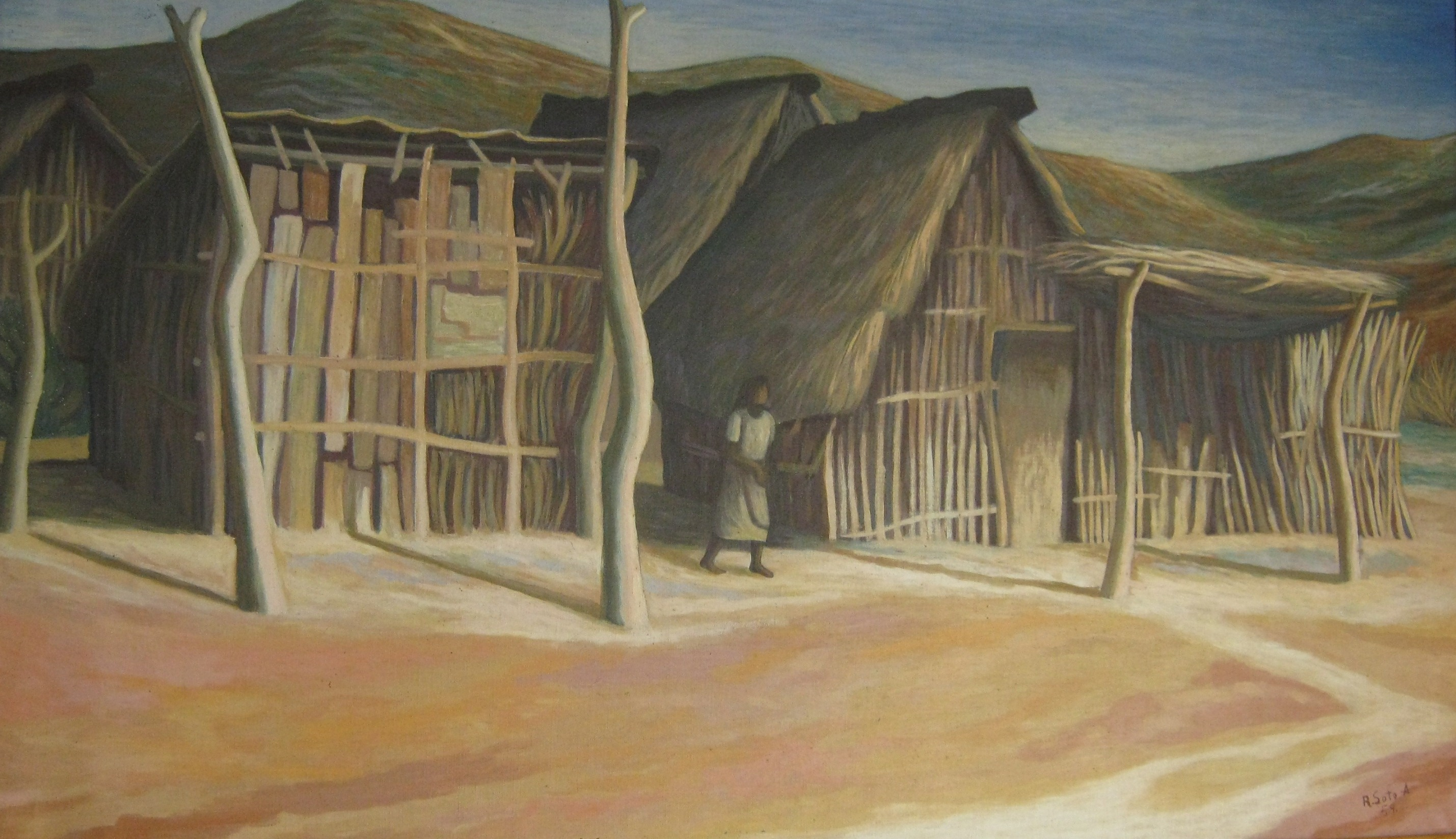 chozas en San luis potosi.jpg